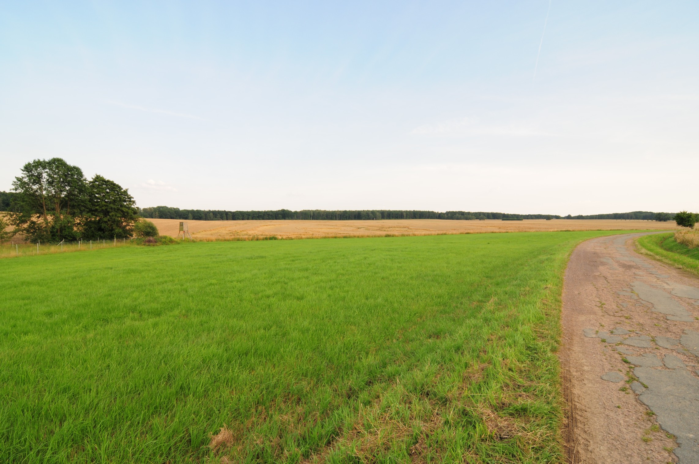 Der Zellwald, Westrand, ungefähr auf Höhe des Semmelflügels (Sachsen, Deutschland)